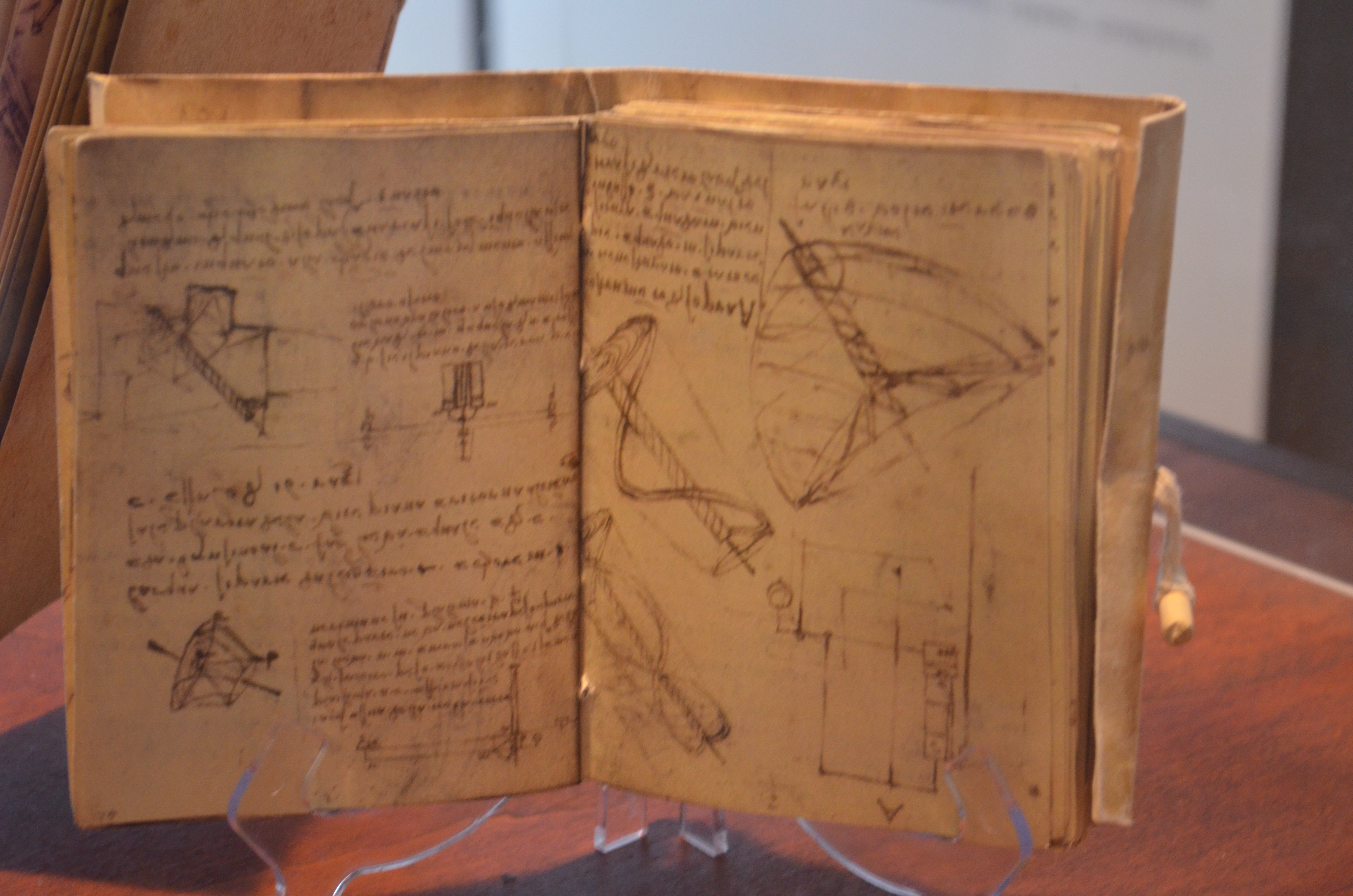 Виставка «Геній Да Вінчі» (Київ)